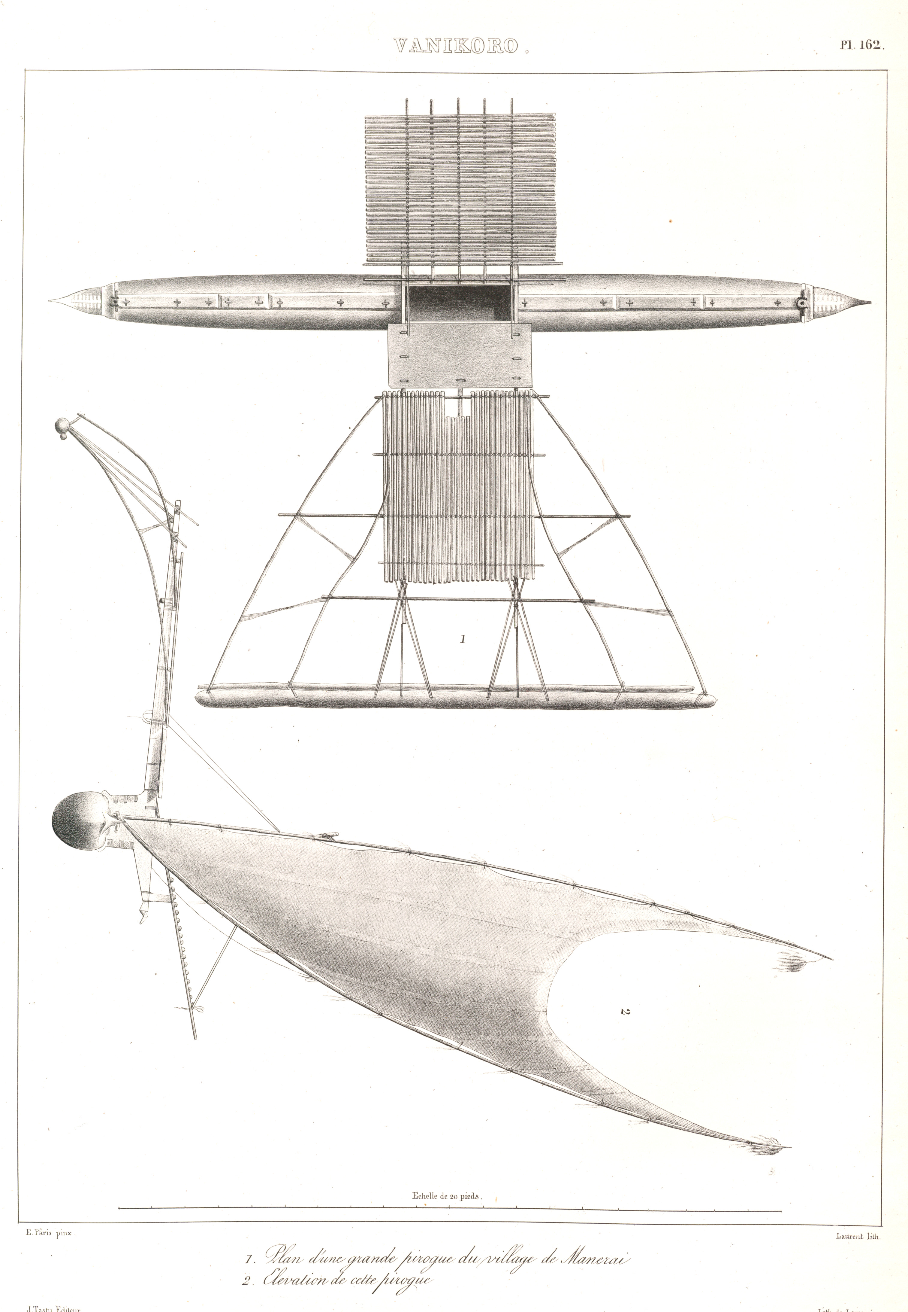 François-Edmond Pâris, Vanikoro : 1. Plan d'une grande pirogue du village de Manerai; 2. Élévation de cette pirogue. (expédition d'Urville 1827-1829)